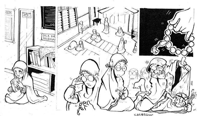 Komik Awek Aspuri(Ujang).